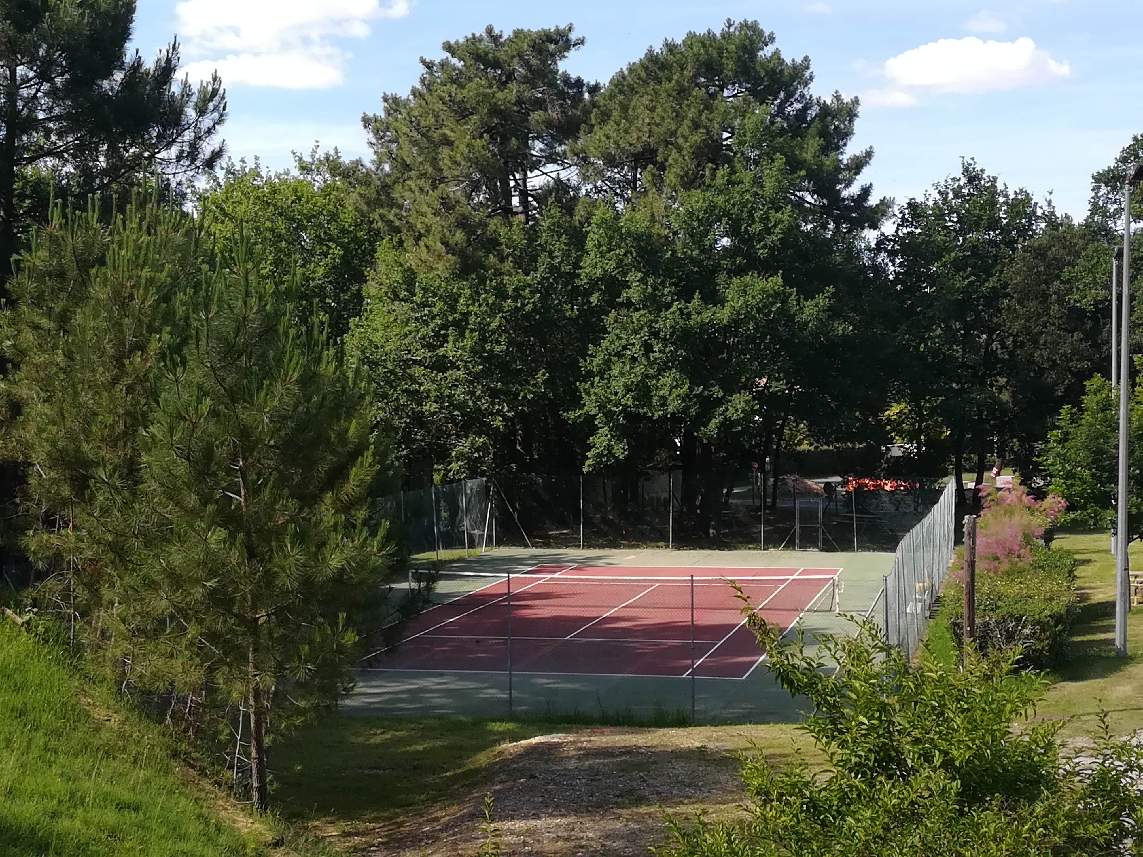 Le tennis de St-Augustin (17)